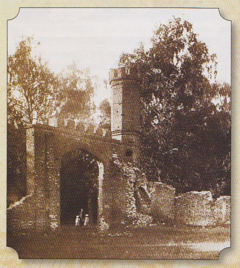 Башня и ворота в усадебном парке Баратынских Мара. Фотография начала XX века - Кирсановский краеведческий музей.